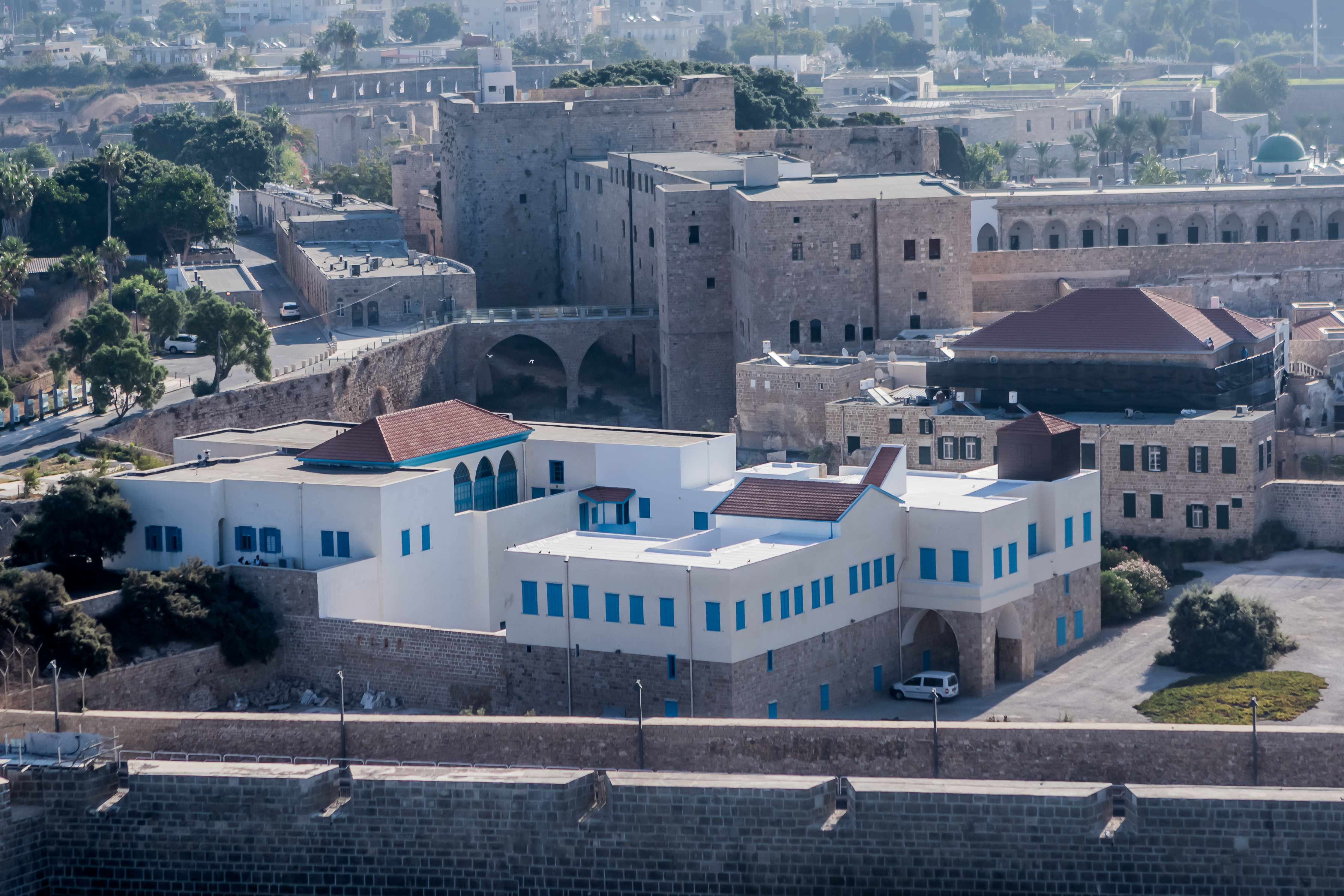 המצודה בעכו נבנתה בימי הטורקים על בסיסה של המצודה ההוספיטלרית בצפונה של העיר העתיקה. המצודה הייתה חלק מן המבנה ההגנתי של עכו, וצידה הצפוני שולב בחומה הצפונית ובמגדל השמירה בורג' אל חזינה. המצודה בנויה סביב שתי חצרות מלבניות, אורכה ממזרח למערב הוא כ-170 מטר ורוחבה כמאה מטרים. במהלך המאה ה-20 שימשה המצודה כבית כלא, ובזמן המנדט הבריטי שימשה גם להוצאה להורג של עולי הגרדום. ב-4 במאי 1947 נערך אחד ממבצעי האצ"ל הנועזים, פריצת כלא עכו, שבמסגרתו פרצו חברי האצ"ל אל המצודה, ושחררו רבים מן הכלואים בה. לאחר קום המדינה שימש המקום כבית חולים פסיכיאטרי.